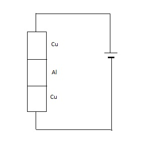 Vara, alumīnija, vara cilindri strāvas avota ķēdē